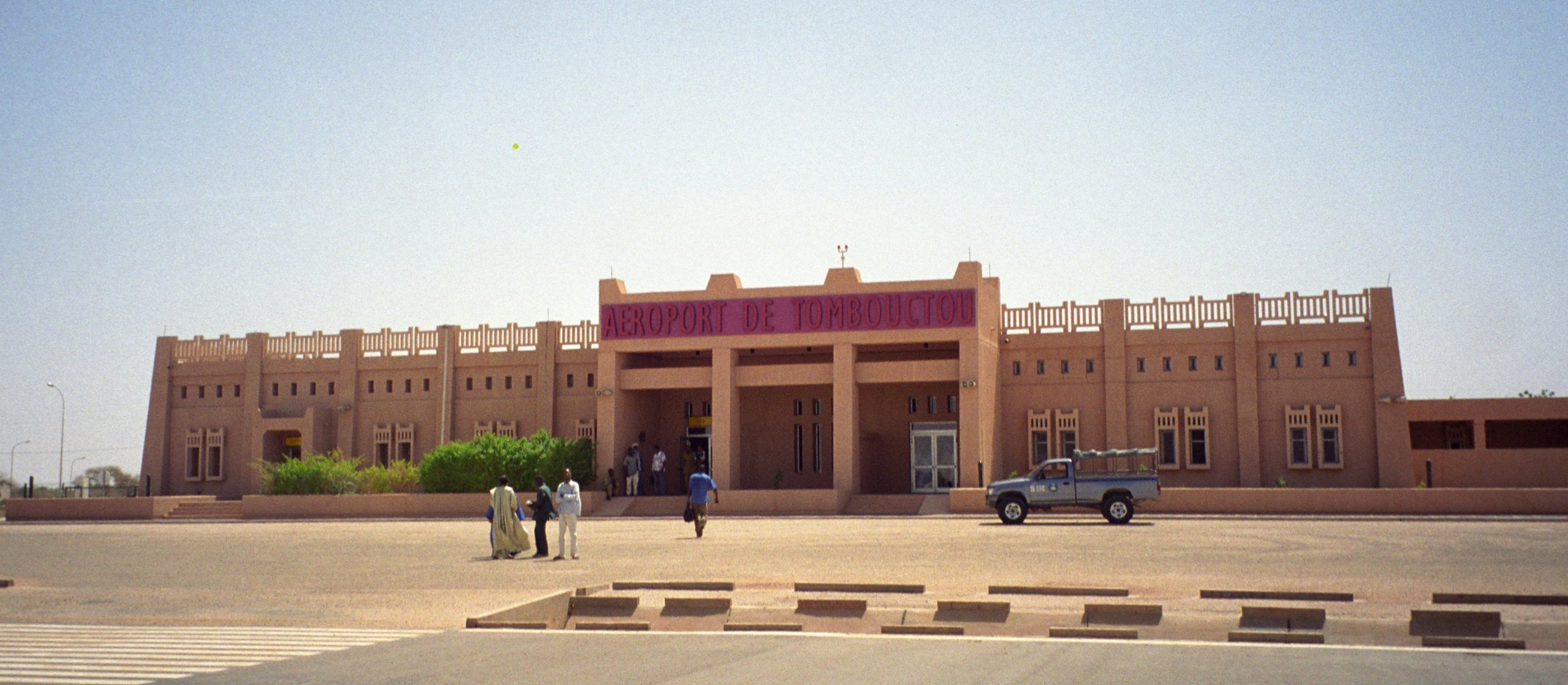 Timbuktu Airport